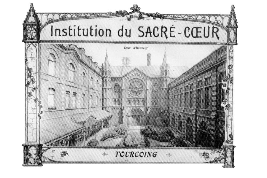 Cour d'honneur de l'Institution Libre du Sacré-Coeur (Tourcoing) vers 1900